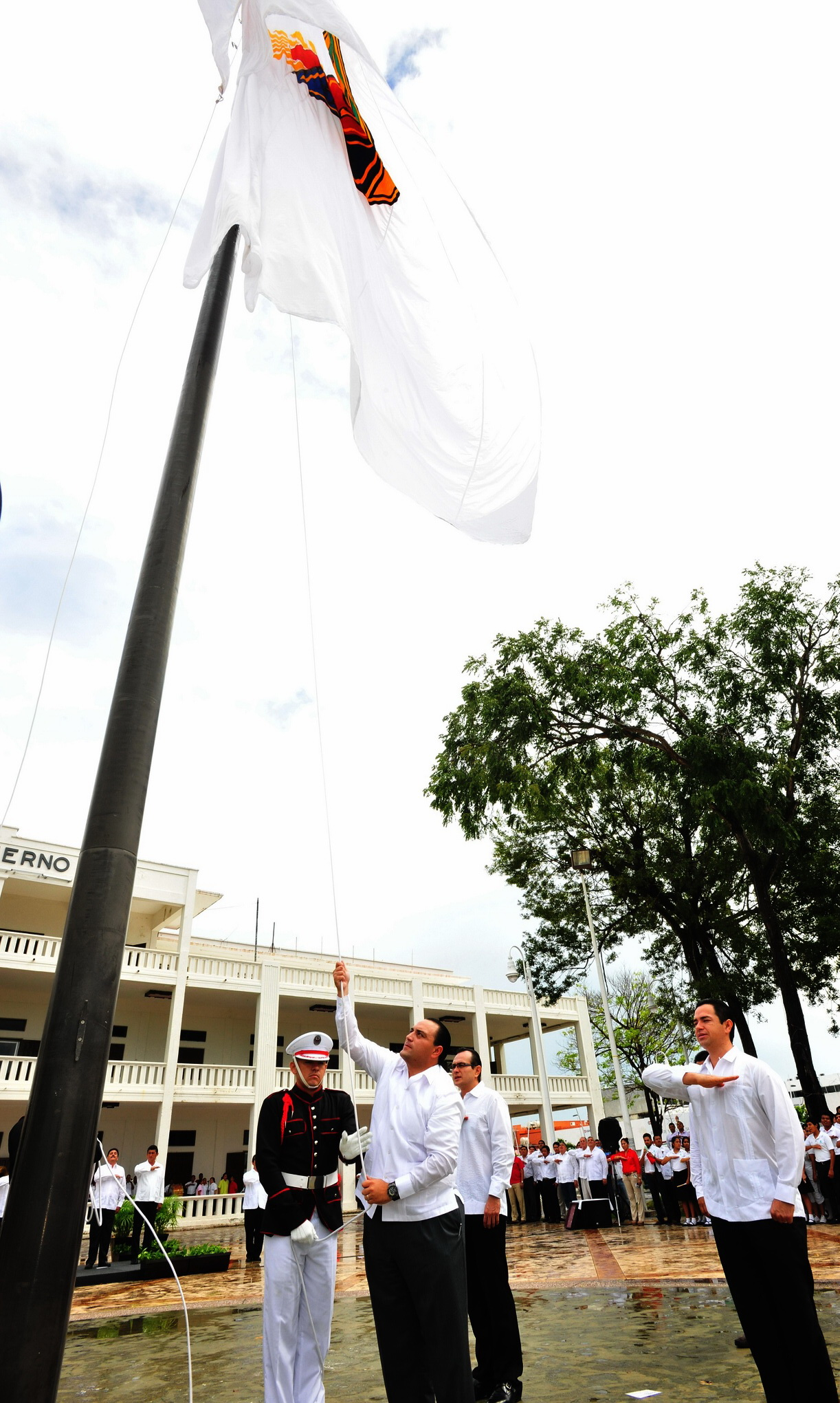 Gobernador Roberto Borge Angulo con la bandera de Qroo